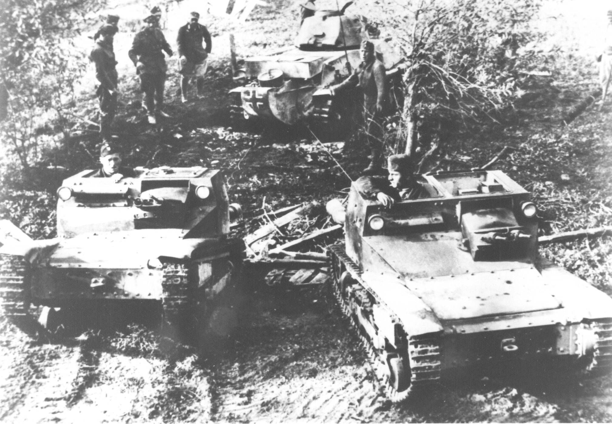 Srpskohrvatski / српскохрватски: Nemci i ustaše u akciji između Gornjeg Vakufa i Jajca, 1942.